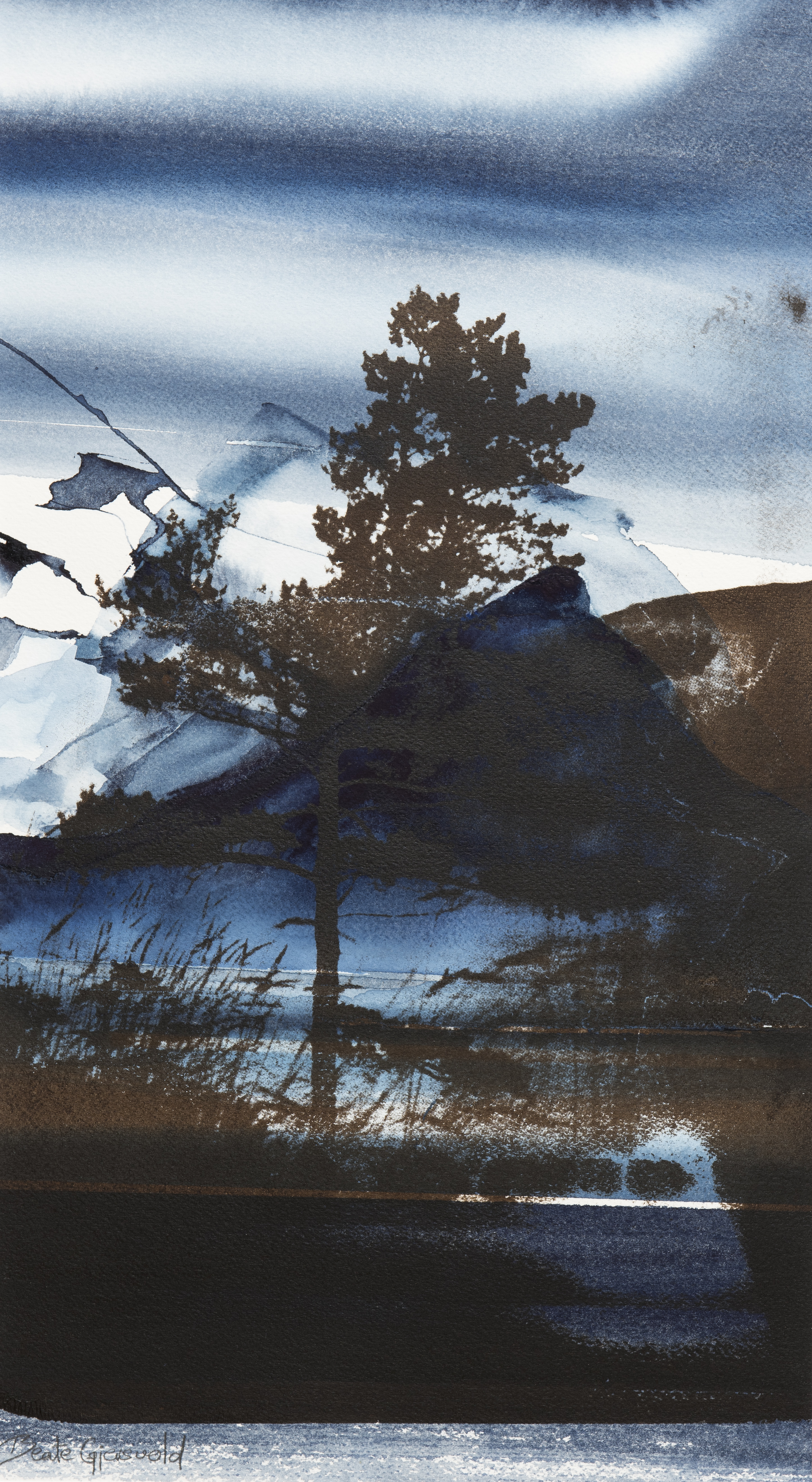 «I skyggen av fjellet» (2016). Silketrykk (treet) på akvarellmaleri. 50 x 76 cm Kunstner: Beate Gjersvold.